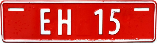 Prøveskilt for forhandler